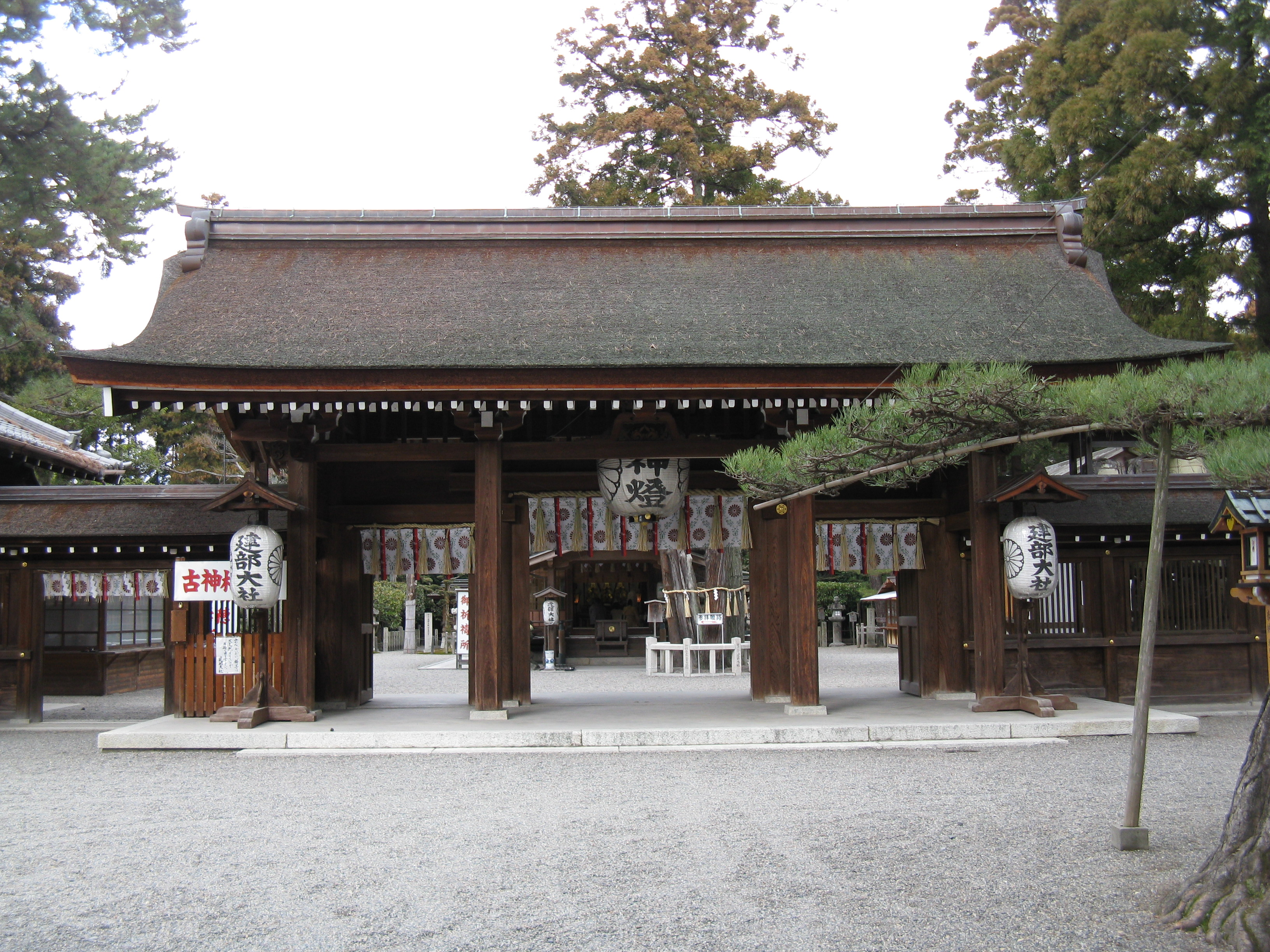 建部大社 神門